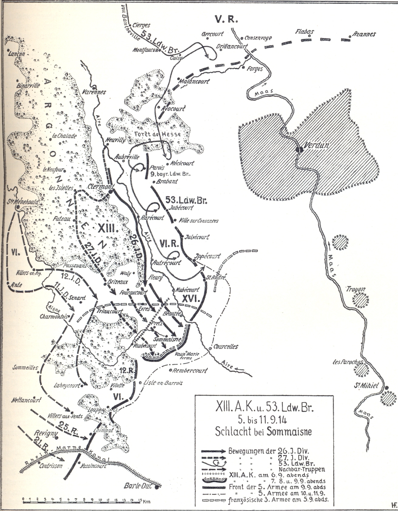 Karte Seite 23: XIII. Armee-Korps bei Sommaisne 1914